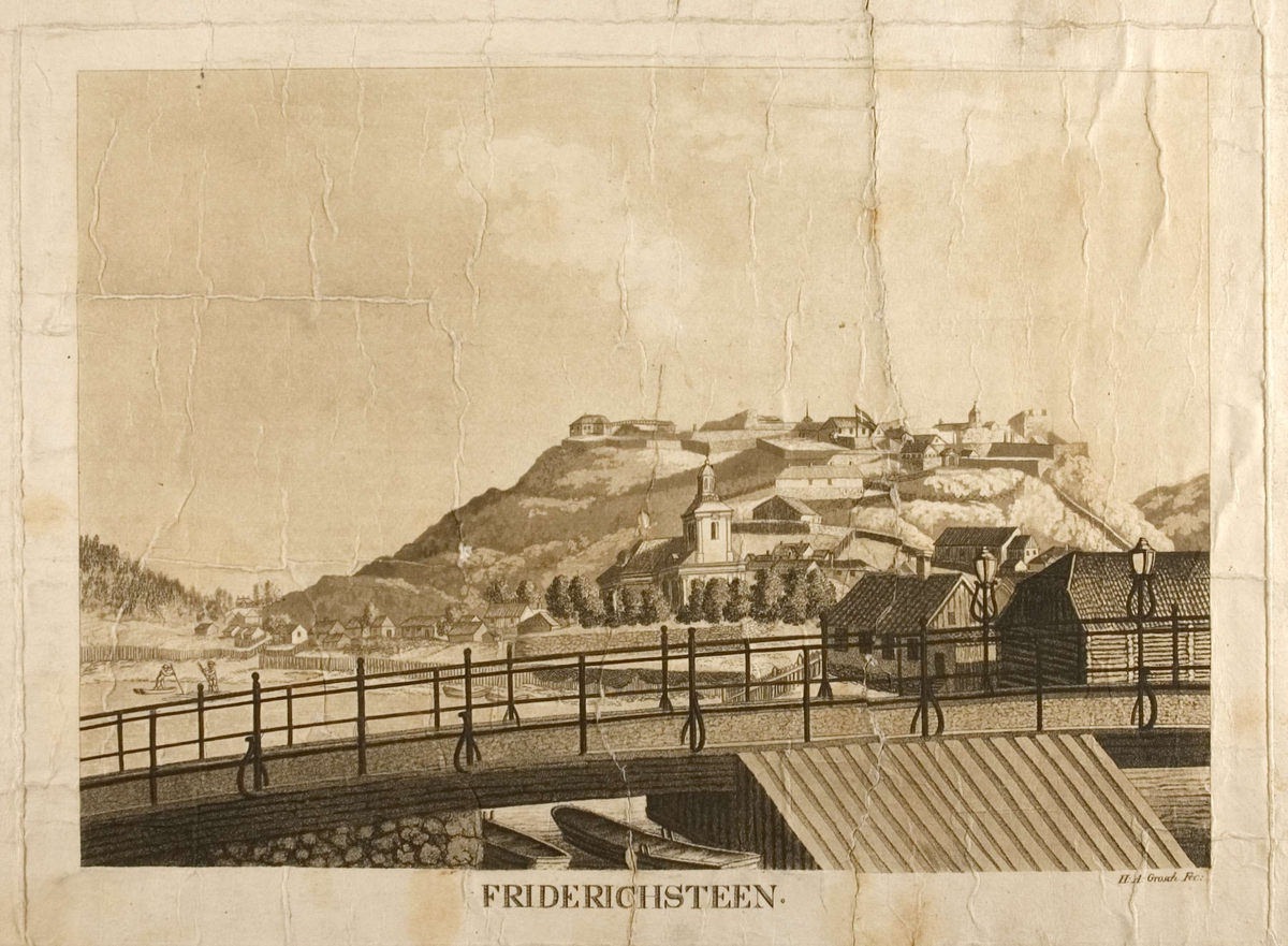 Halden og Fredriksten festning. Akvatint av Heinrich August Grosch, tilhører Norsk Folkemuseum Påskrift (Trykt): FRIDERICHSTEEN. Signatur (Trykt): Grosch fec. Mål:Bredde: 47 cm Høyde: 33 cm Identifikasjonsnr.: NF.1897-0471